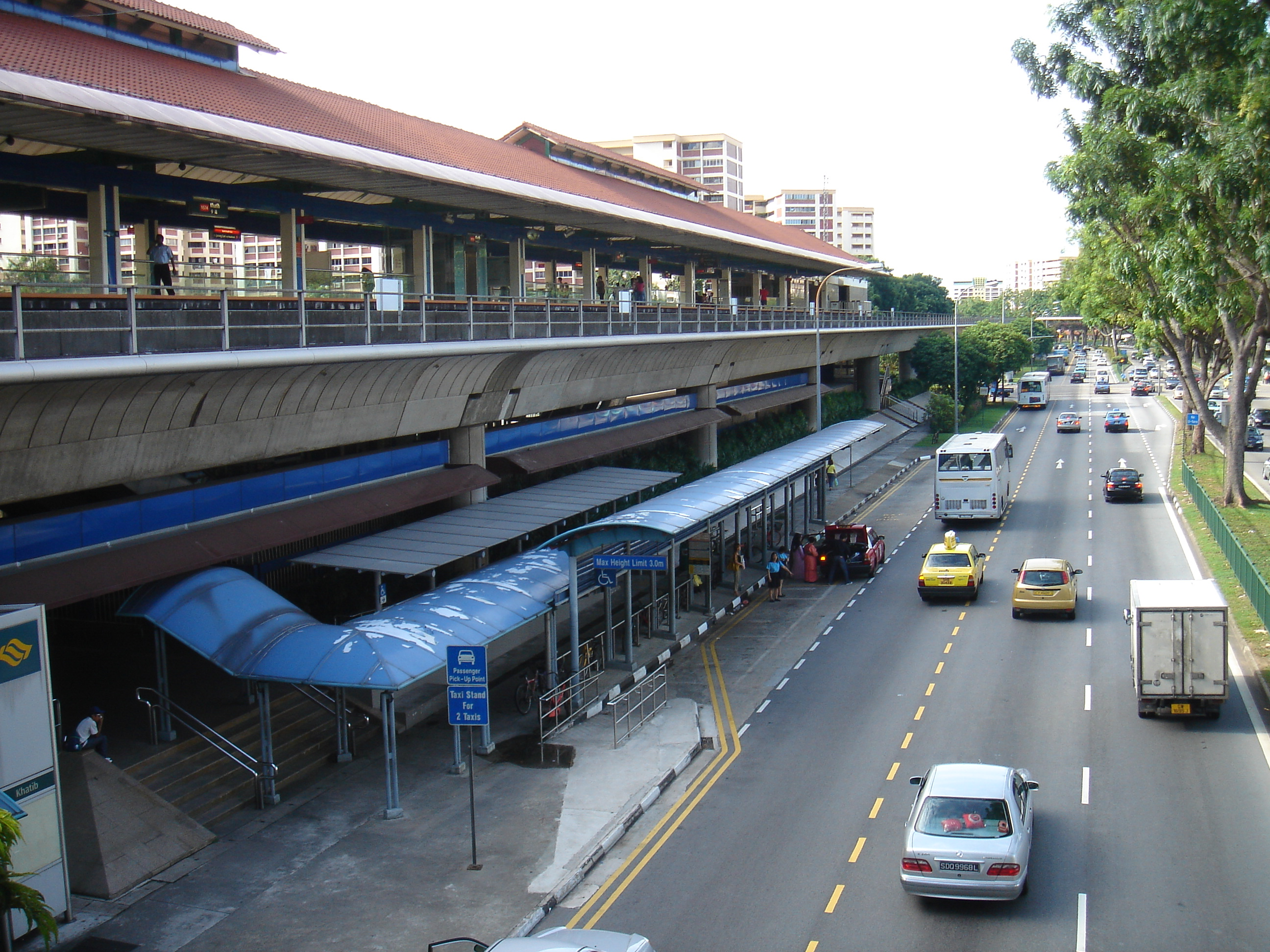 Khatib MRT Station, Singapore.